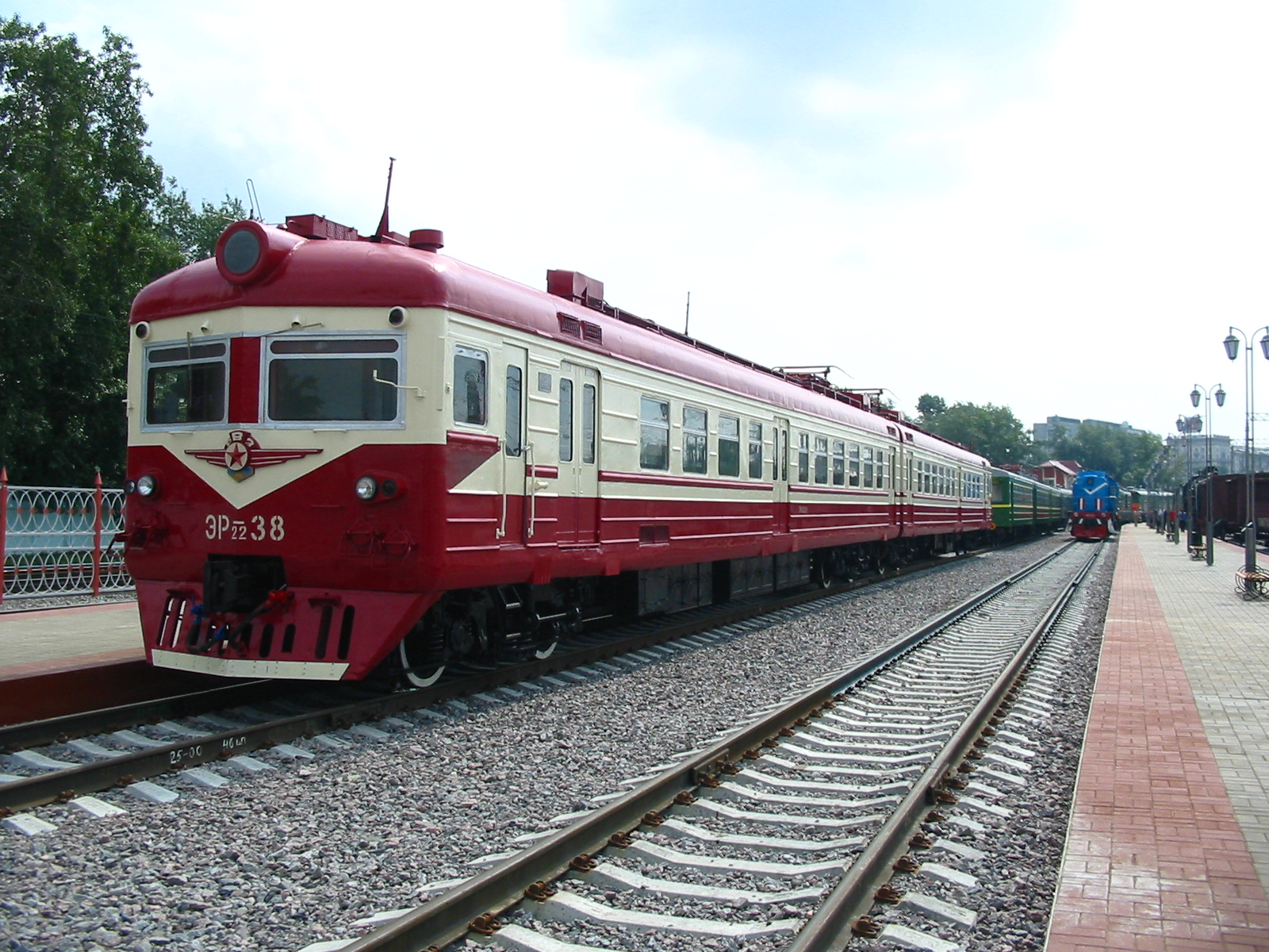 ЭР22-38